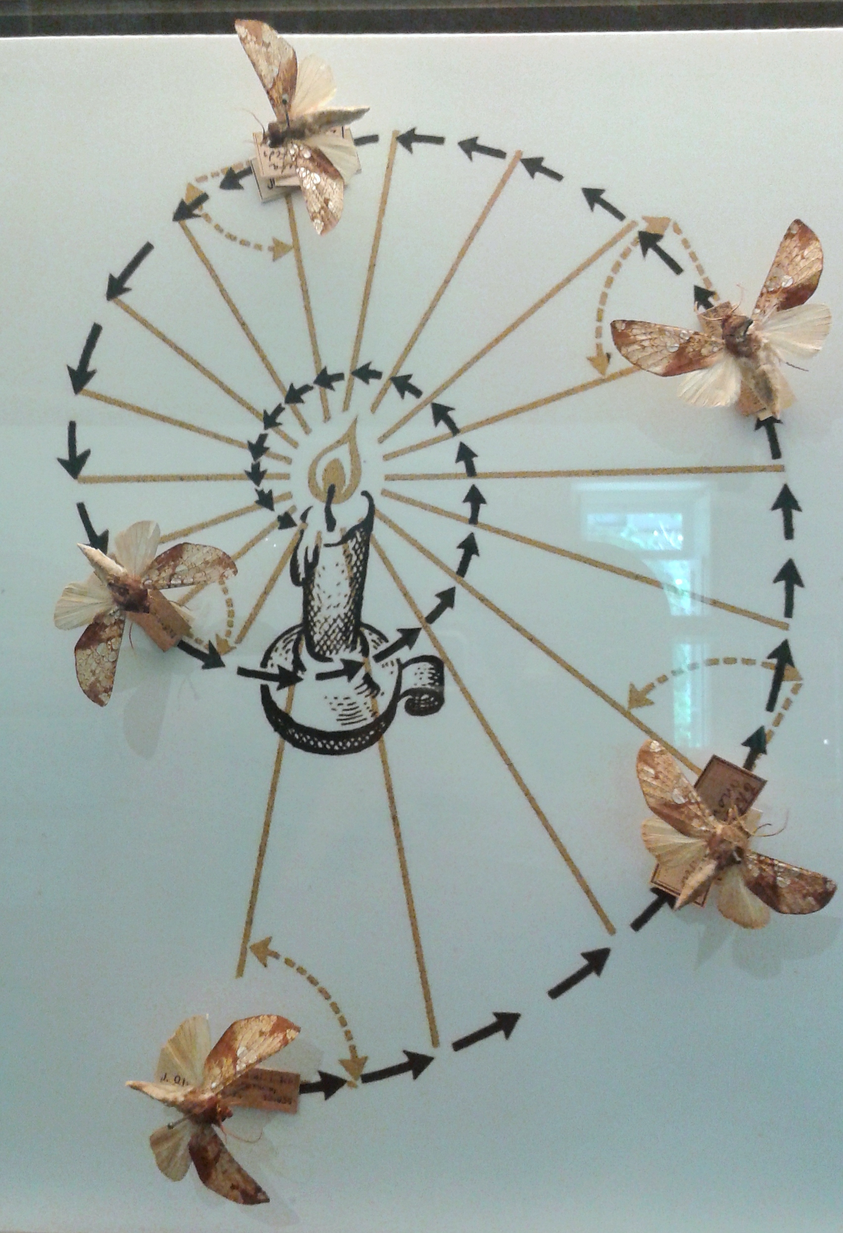 Exposição de Entomologia - Museu Nacional/UFRJ - Rio de Janeiro, Brasil.